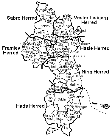 Kort over Århus Amt